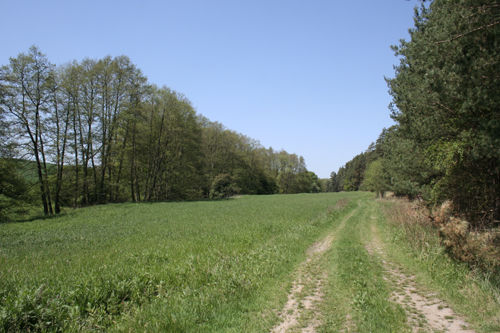 Údolí Čeminského potoka mezi Košeticemi a Rakovnou, levostranný přítok řeky Mže, okres Plzeň-sever, Česká Republika